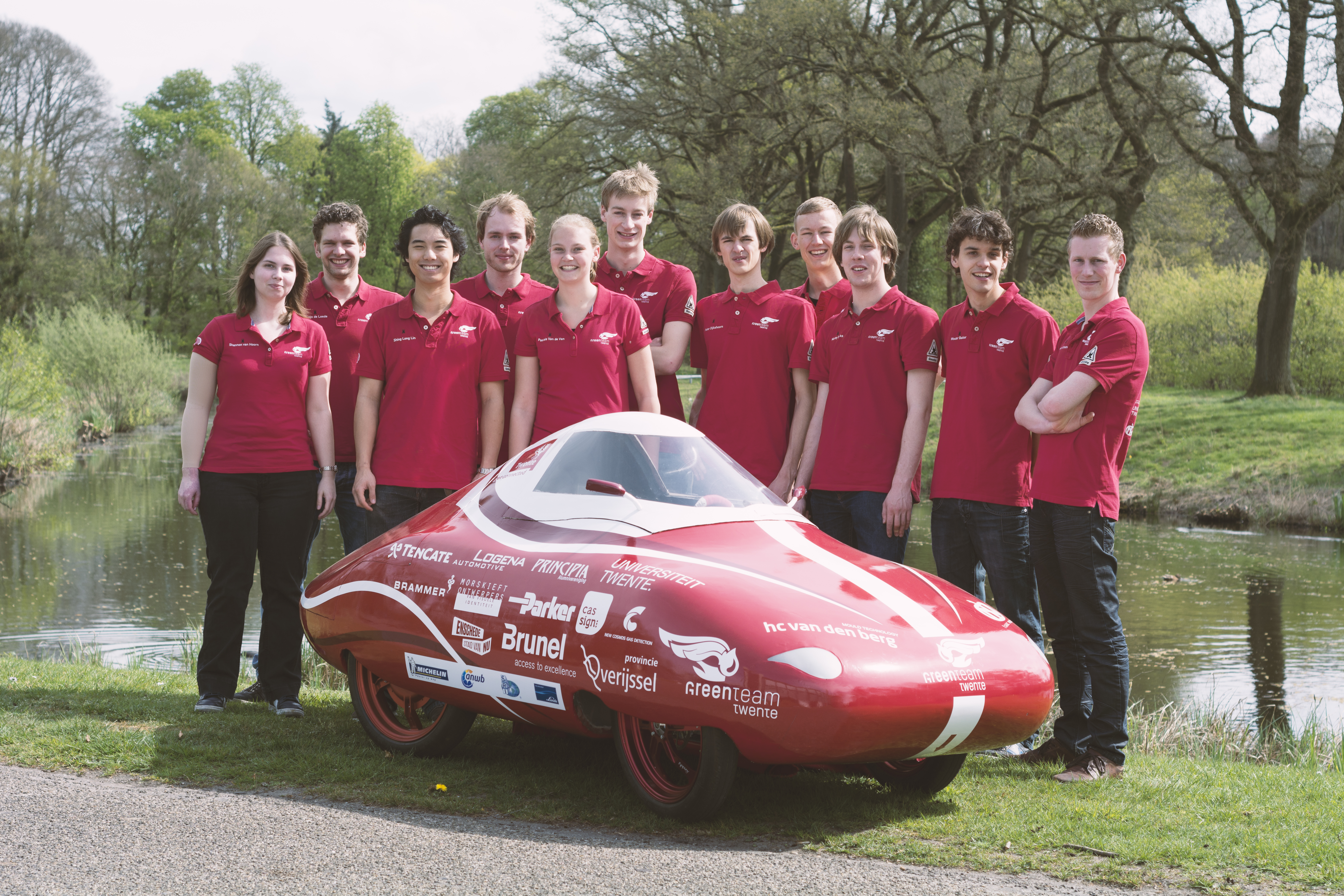 Shell Eco-Marathon 2014 GreenTeam Twente photoshoot